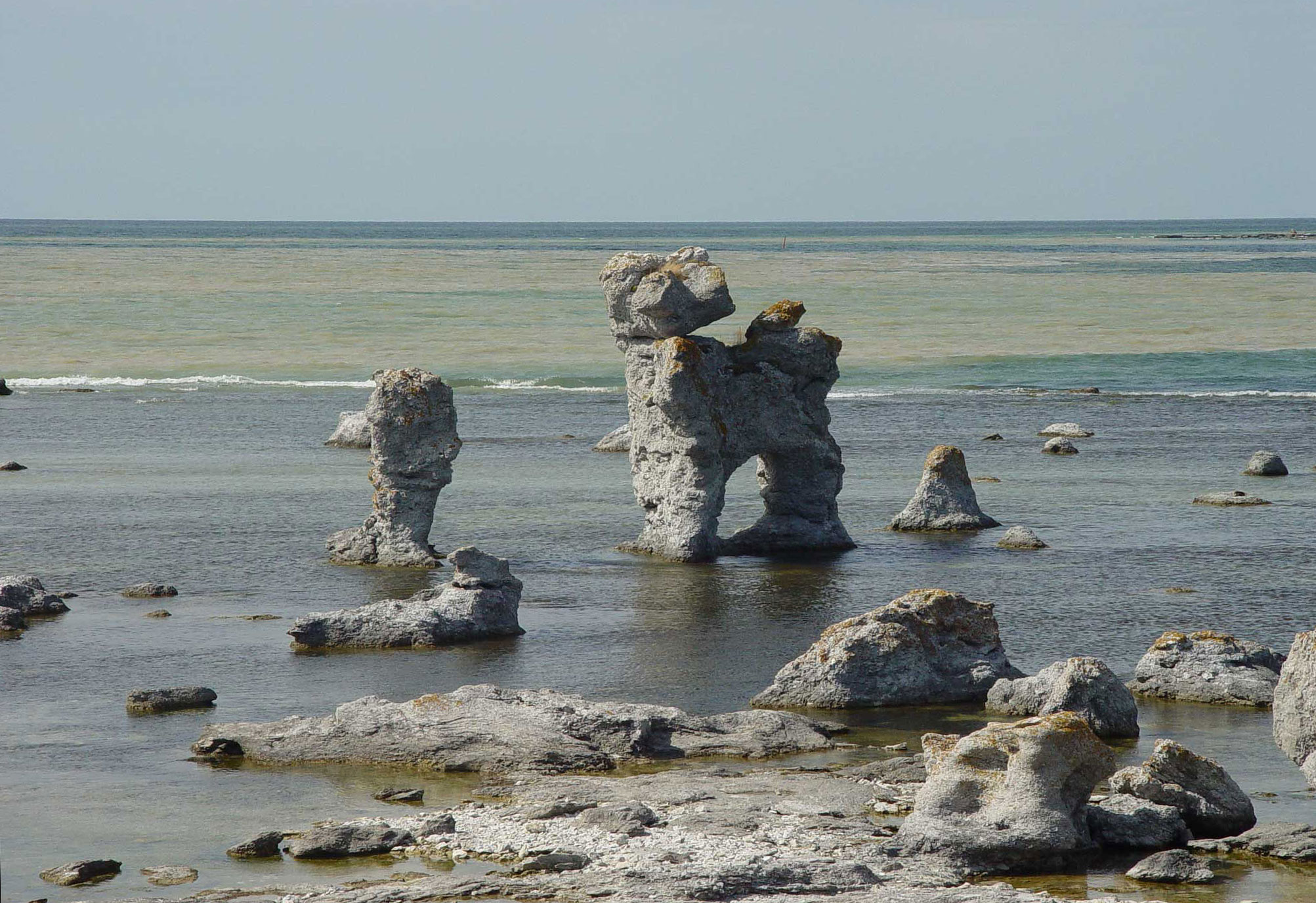 Raukar auf Gotland (Fårö), Naturschutzgebiet Gamlehamn.